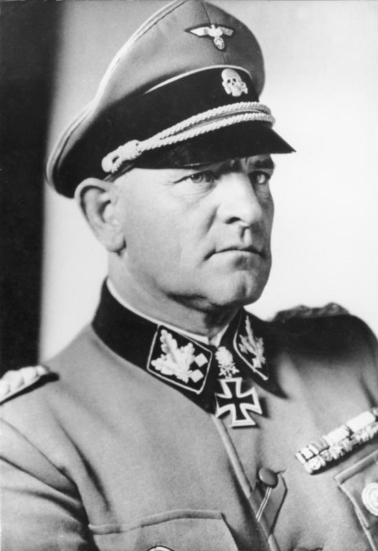 Sepp Dietrich Zentralbild 28.6.1943 Der Kommandeur der SS-Panzer-Grenadier-Division "Leibstandarte SS Adolf Hitler" Träger des Eichenlaubes mit Schwertern zum Ritterkreuz des Eisernen Kreuzes SS-Obergruppenführer und General der Waffen SS Sepp Dietrich [General der Waffen-SS Sepp Dietrich (Porträt)] Abgebildete Personen: Dietrich, Joseph (Sepp): Generaloberst, Ritterkreuz (RK), SS-Oberstgruppenführer, Leibstandarte, Deutschland (GND 11888932X)